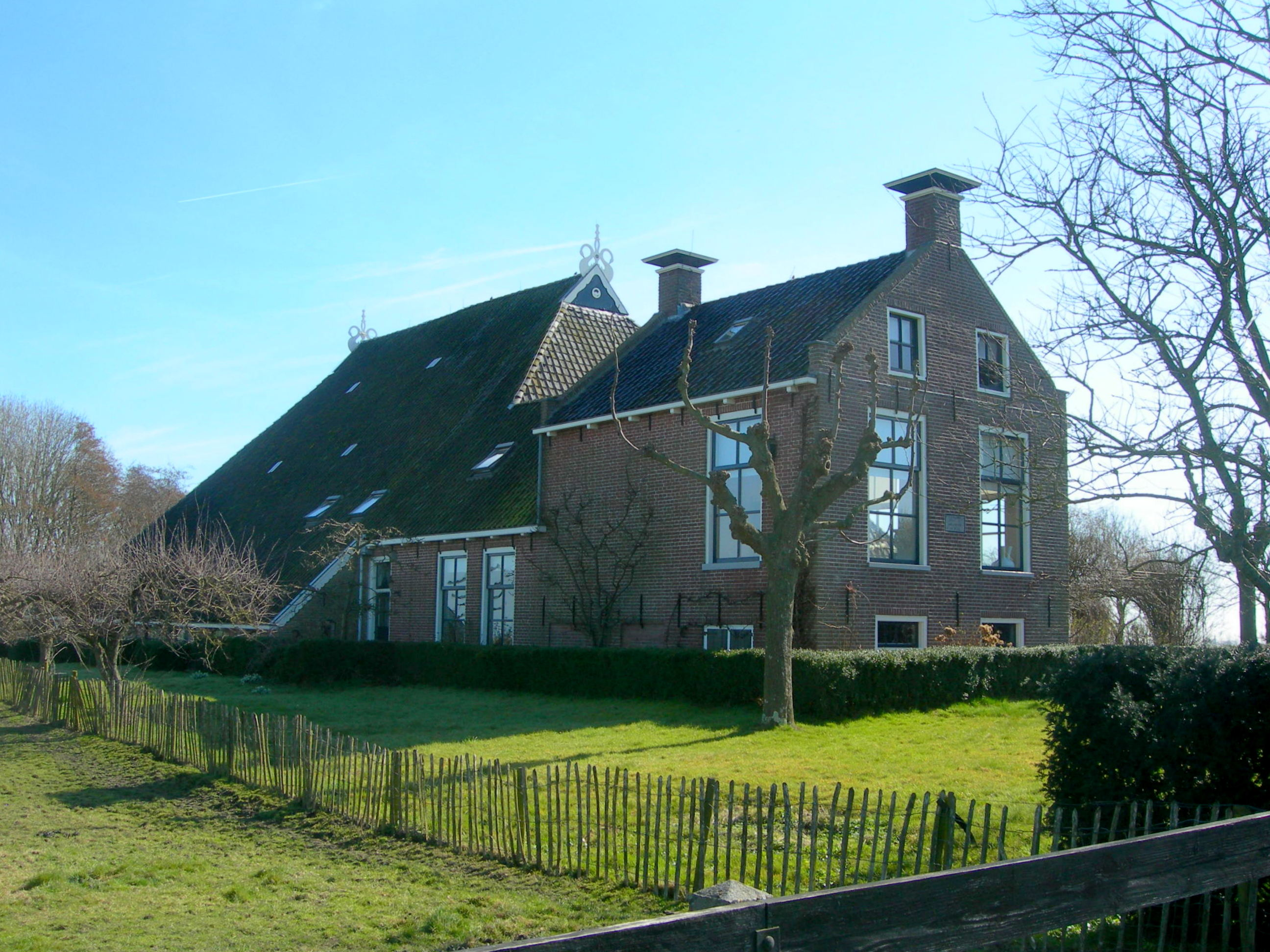 Boerderij Scertinghe State uit 1857 Schetttens